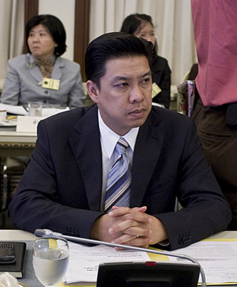 ผู้ช่วยรัฐมนตรีประจำสำนักนายกรัฐมนตรี นายพุทธิพงษ์ ปุณณกันต์ (The Official Site of The Prime Minister of Thailand Photo by พีรพัฒน์ วิมลรังครัตน์)